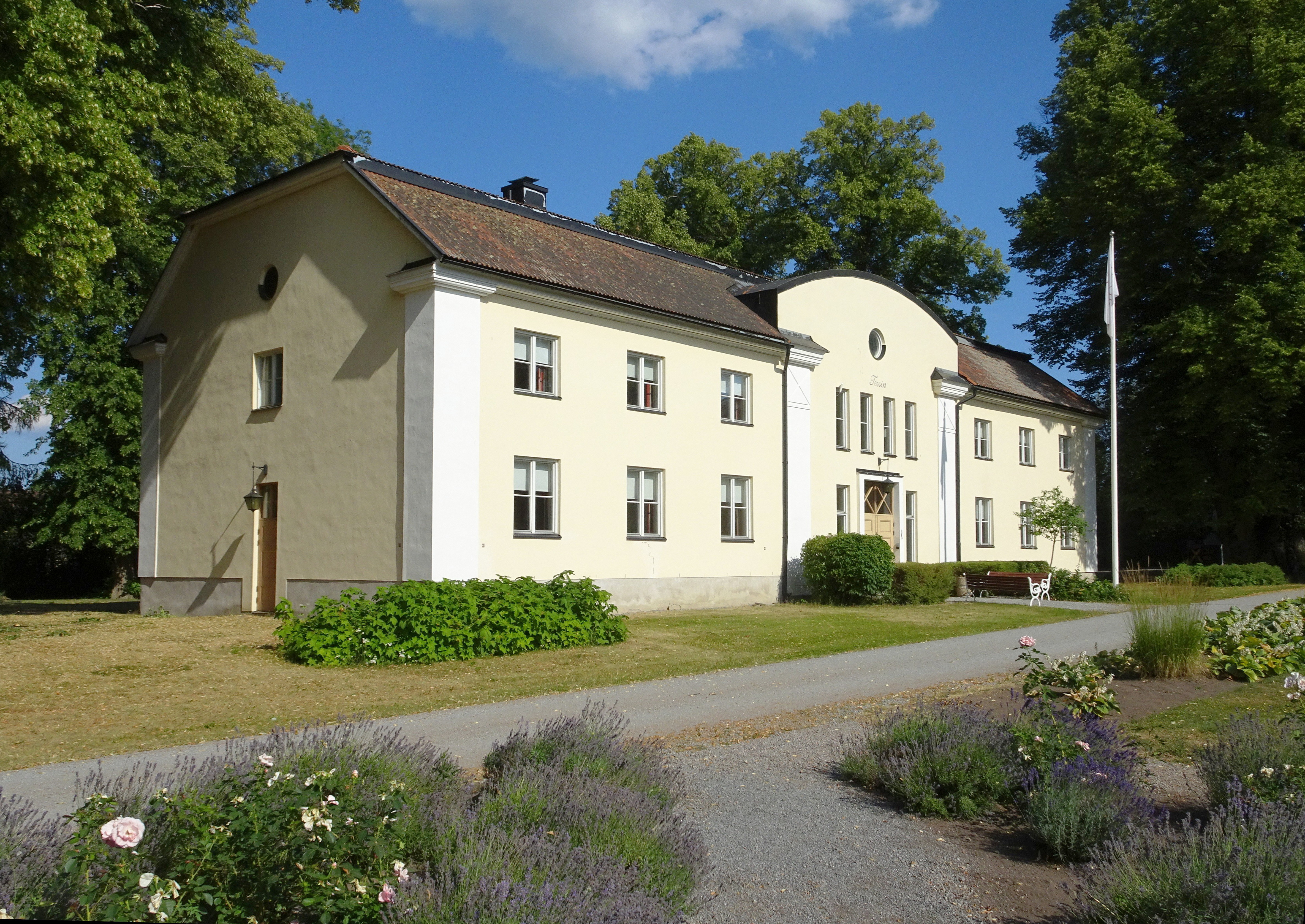 Haga slott, Enköping, flygel "Tessin"